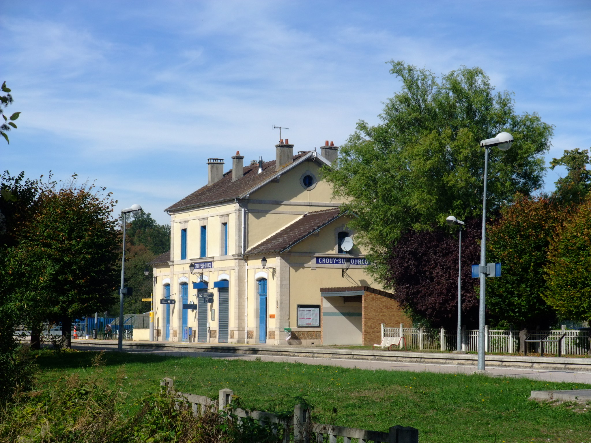 La gare de Crouy-sur-Ourcq